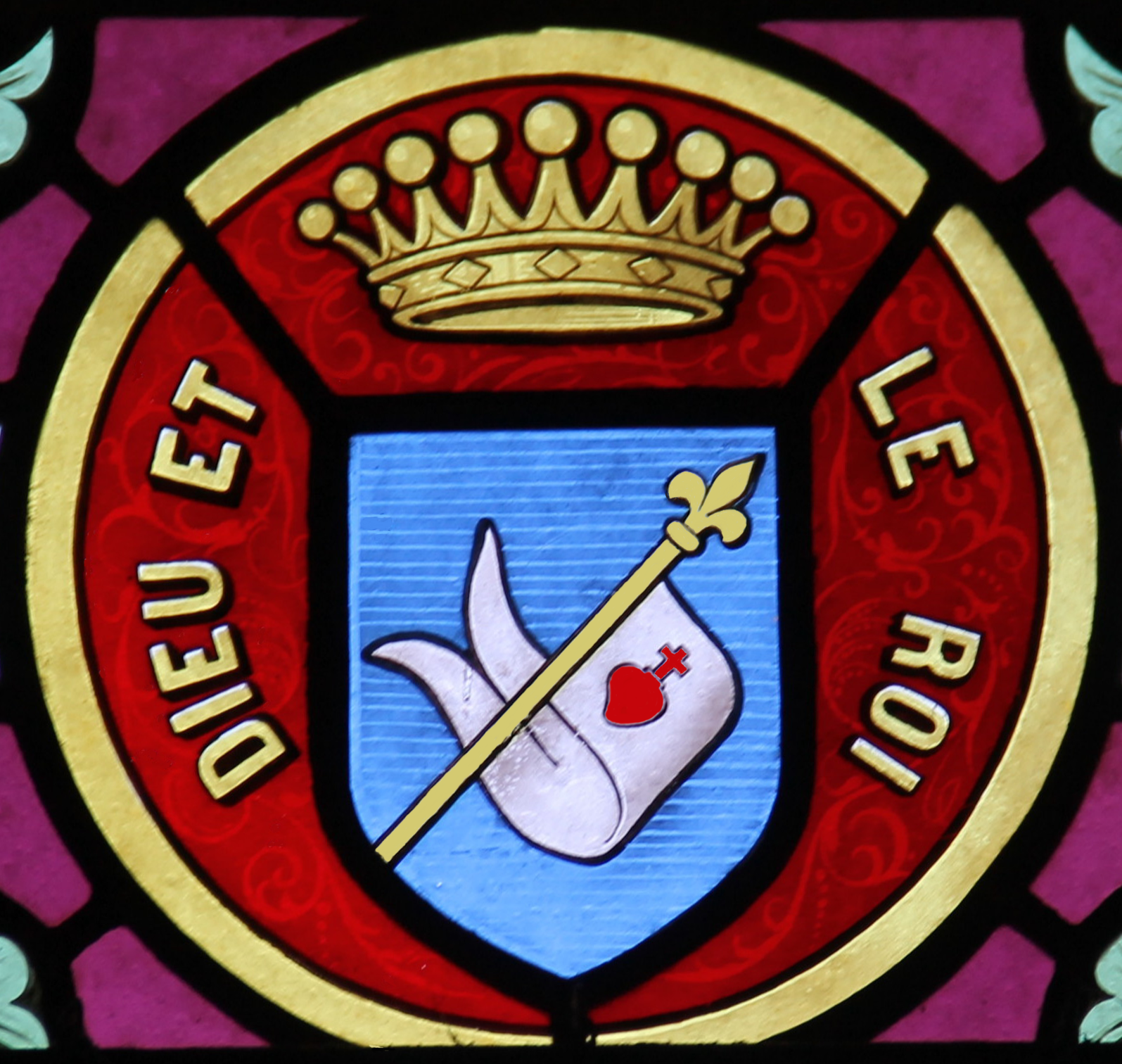 Représentation tirée d'un vitrail de l'église Saint-Pavin au Pin-en-Mauges (49)